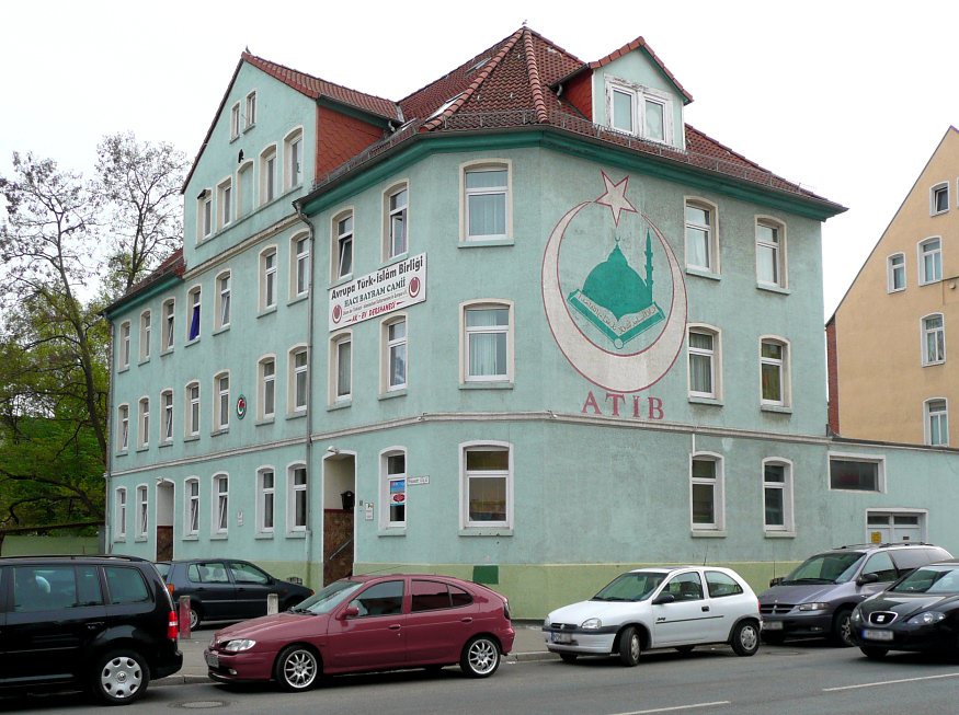 Haci Bayram Moschee Fössestraße in Hannover